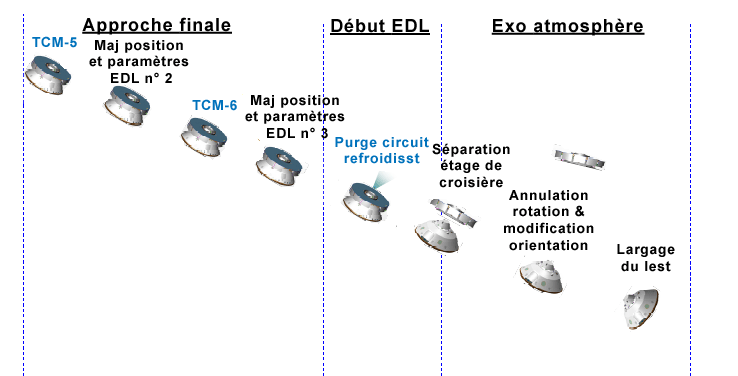 Début de la descente sur Mars de la sonde Mars Science Laboratory